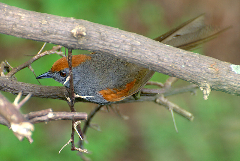 Parque da Independência, Museu do Ipiranga, São Paulo